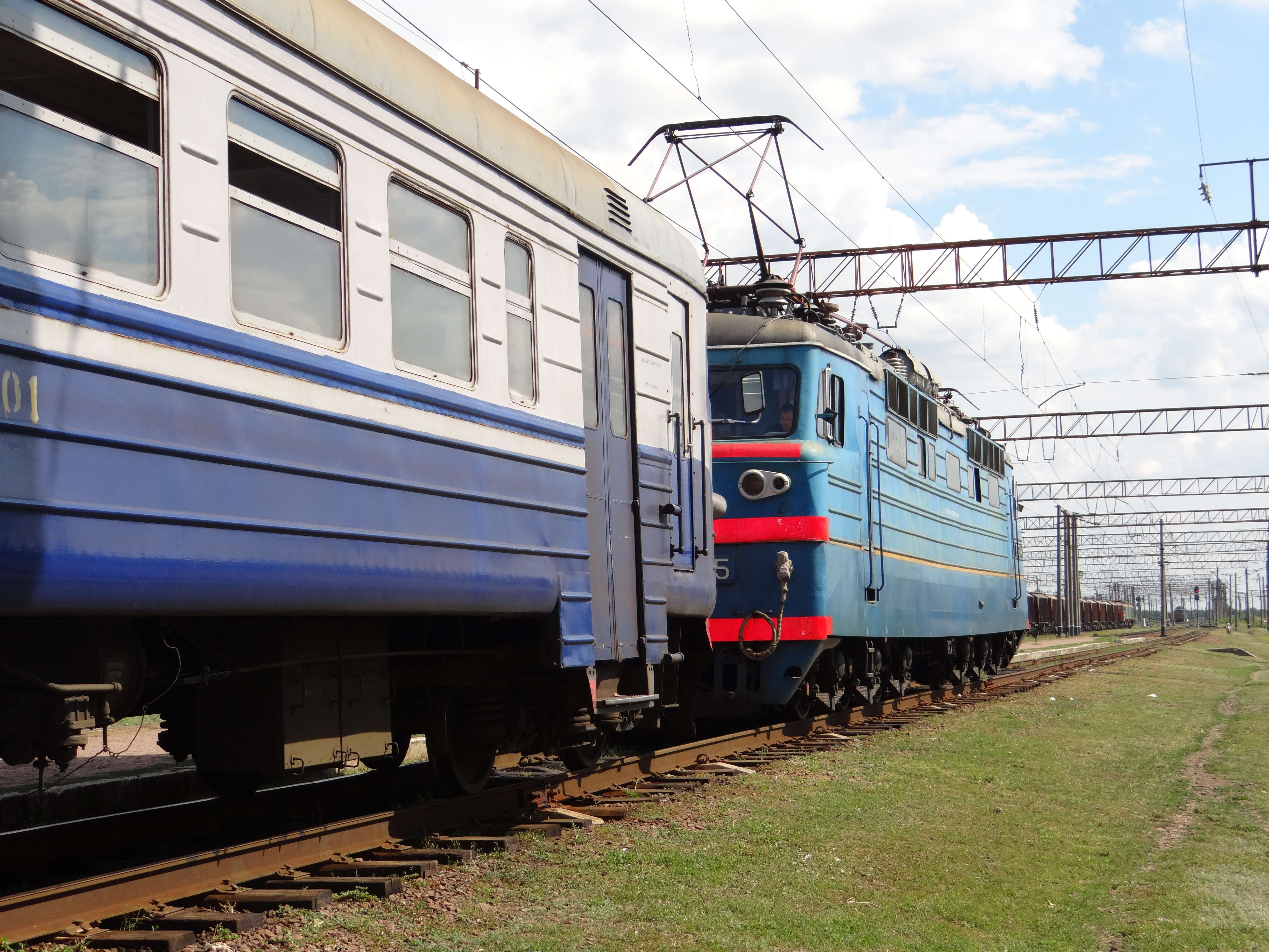 Перечеплення тепловоза на станції Тимкове